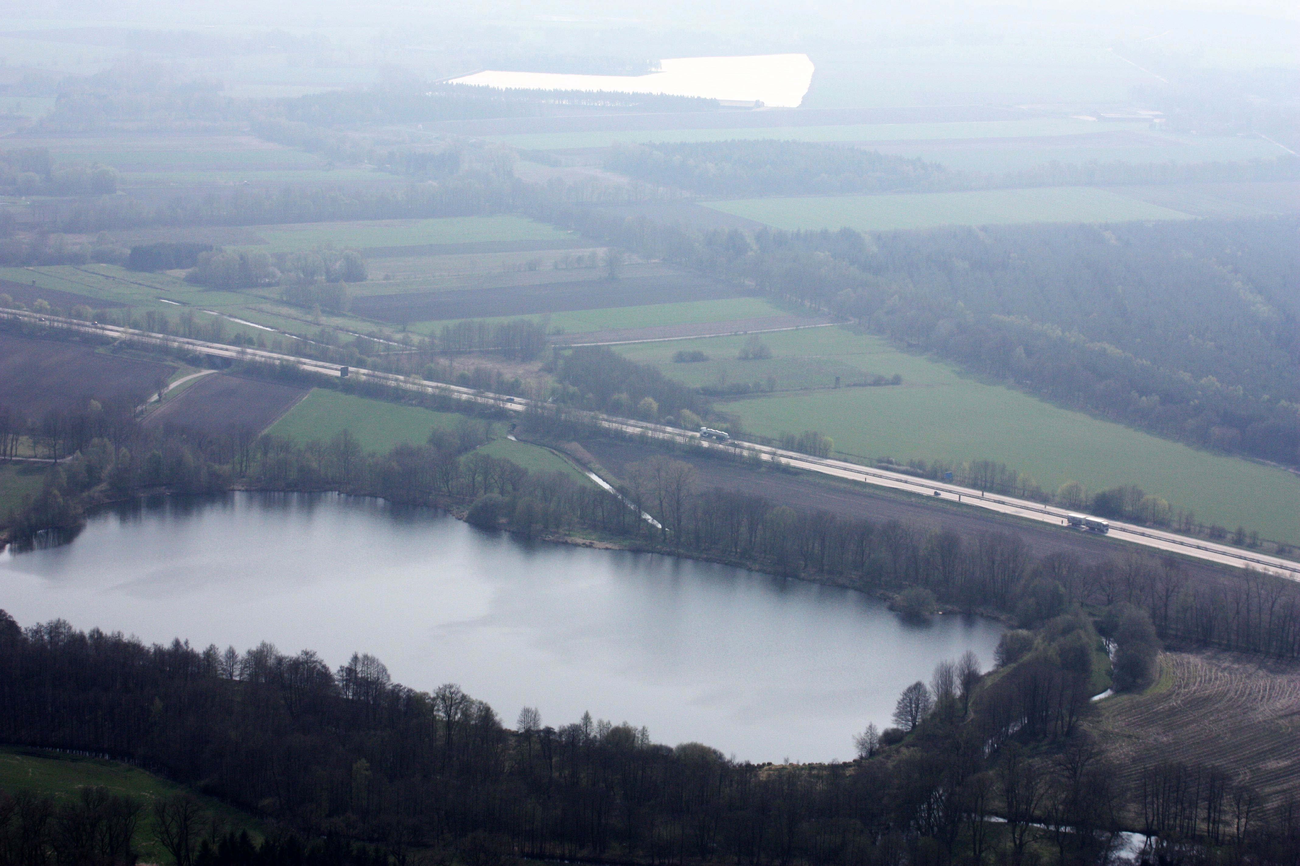 Bundesautobahn 29 südlich der Anschlussstelle Ahlhorn; im Hintergrund der Halener See, vorne der Lethe Baggersee